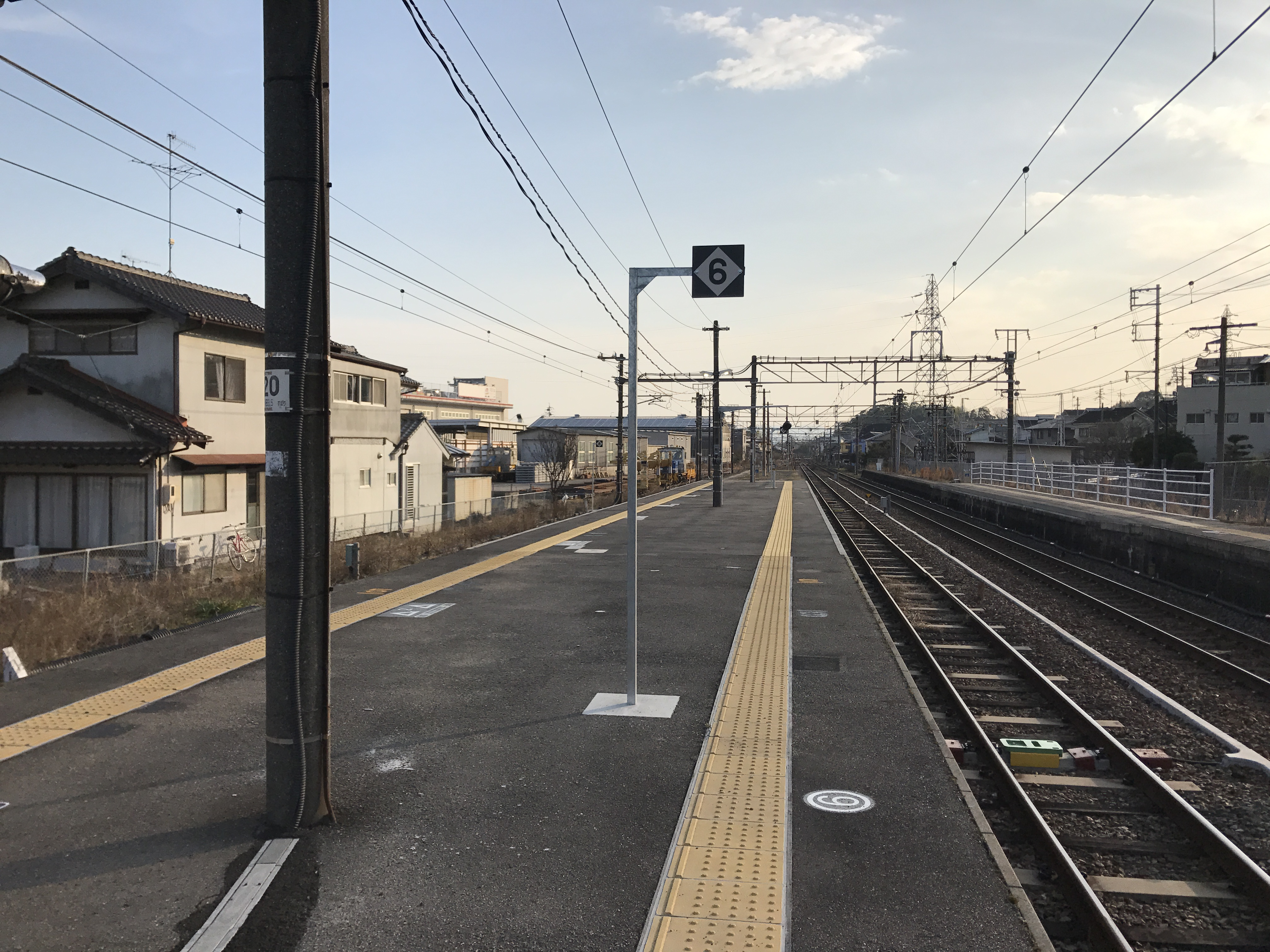 大野浦駅のホーム(奥は玖波方面)